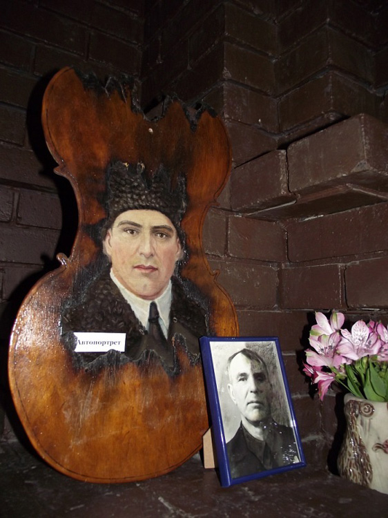 Художня композиція з портретом батька Михайла Мельника - Василя, театр "Крик"